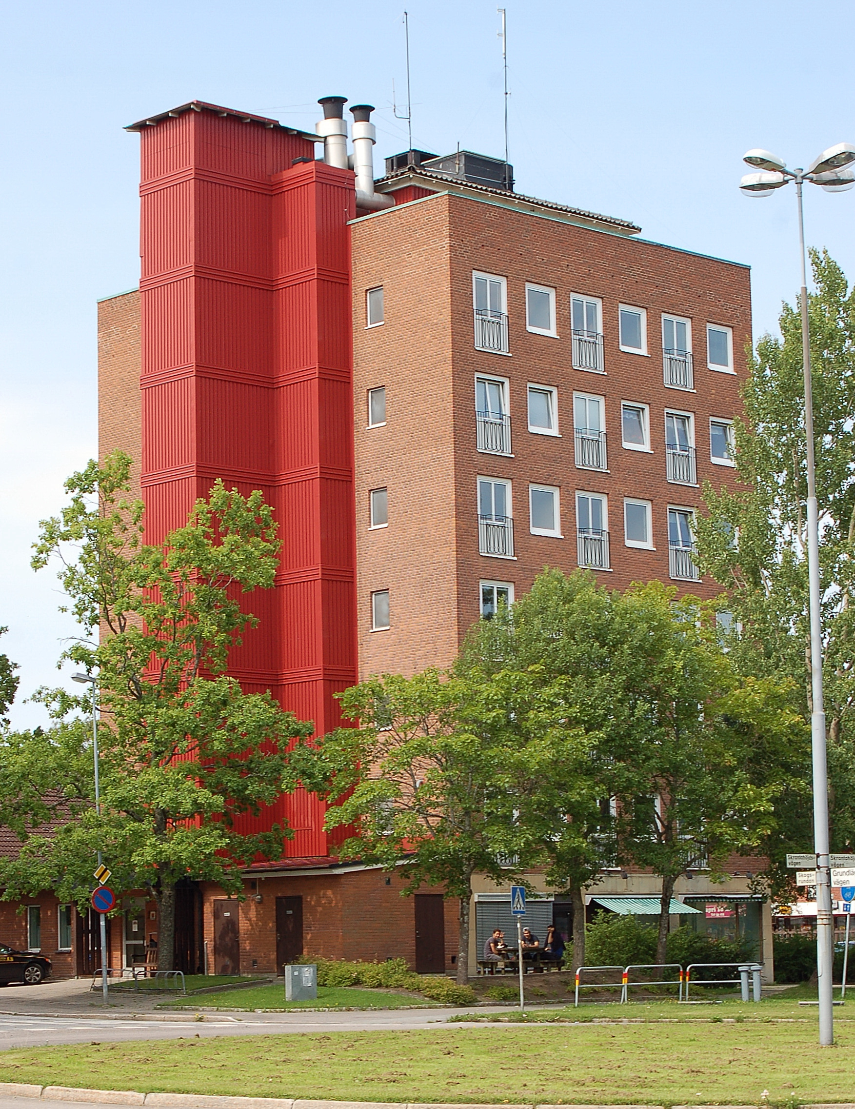 Skrantahuset Karlskoga.